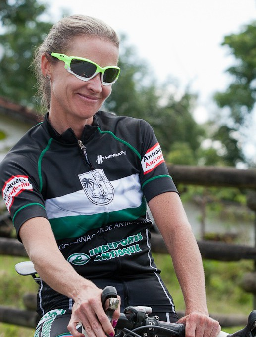 Maria Luisa Calle en el Campeonato Panamericano de Ciclismo de 2011